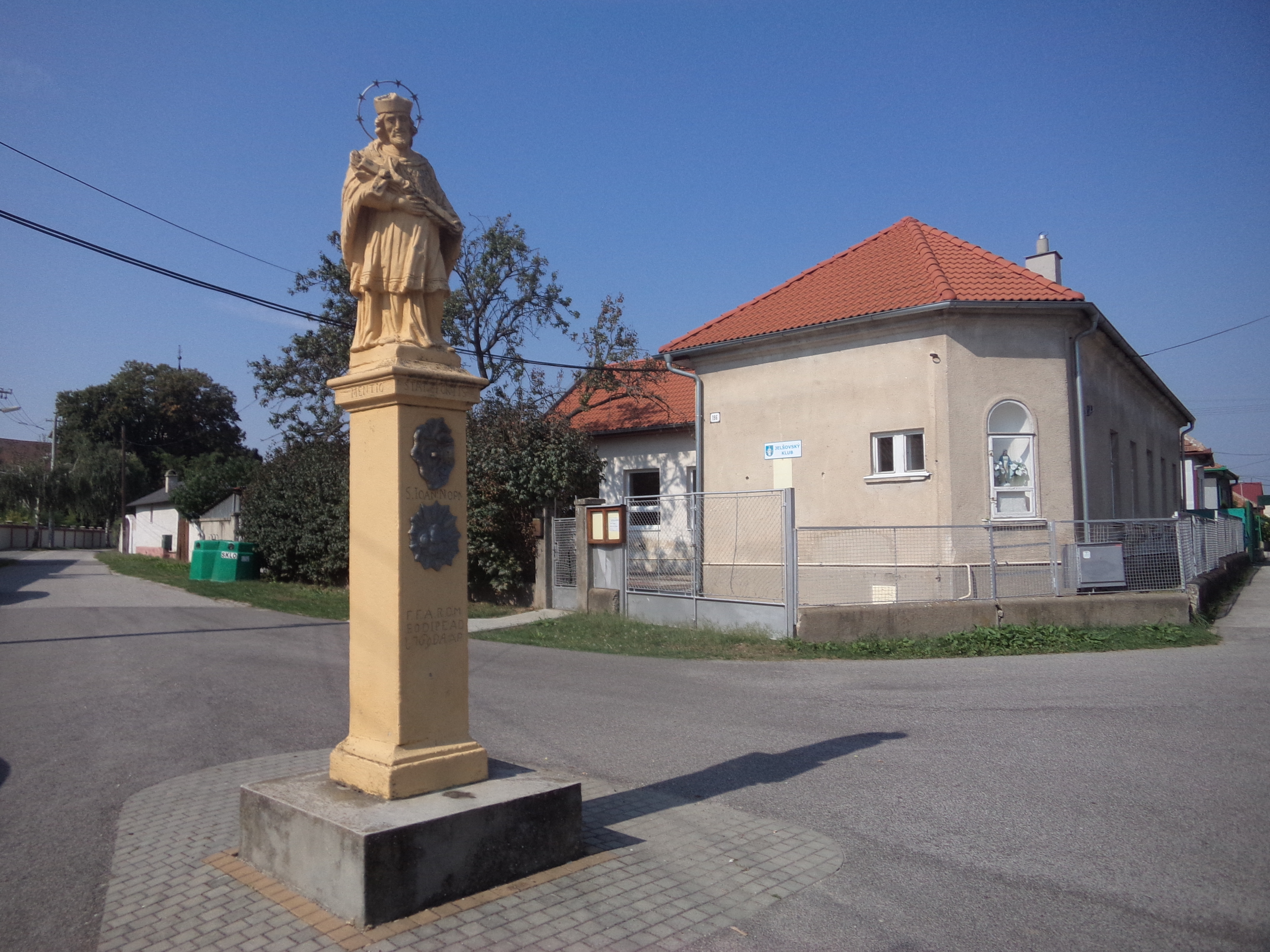 Nyitraegerszeg